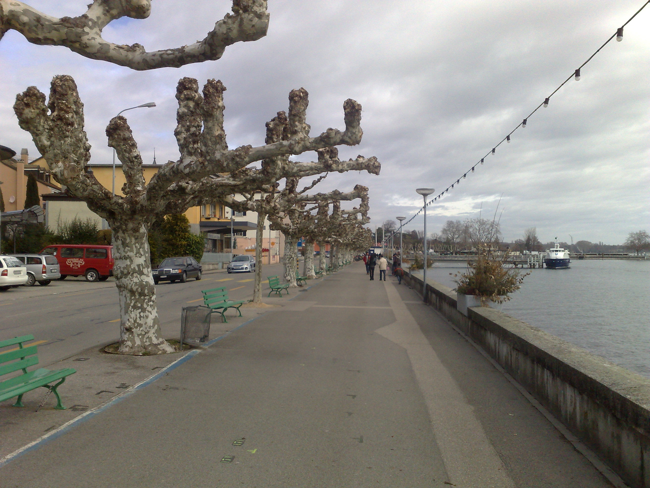 Route suisse à Nyon en hiver, au bord du lac Léman